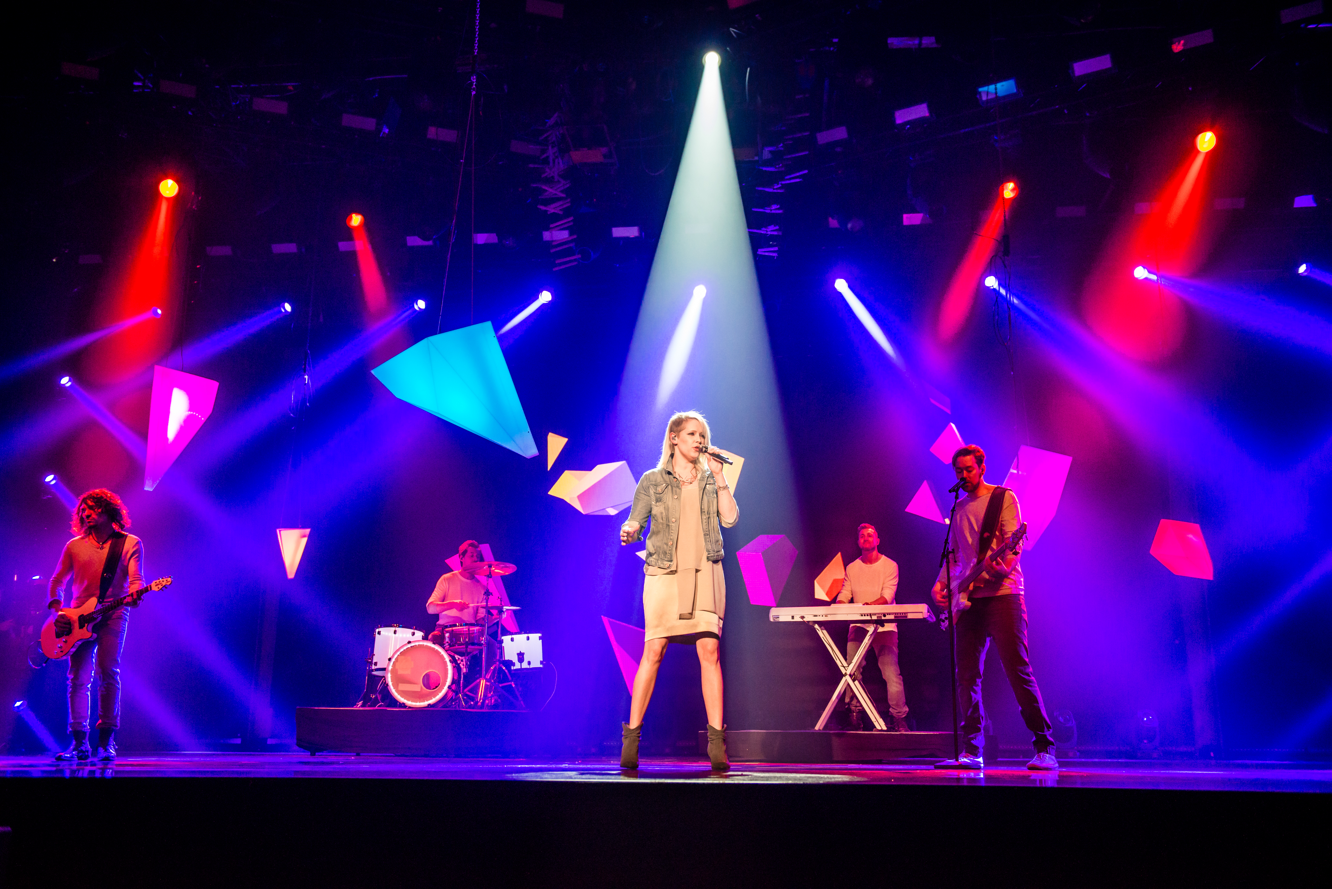 Eurovision Song Contest 2016 - Unser Lied für Stockholm - Luxuslärm